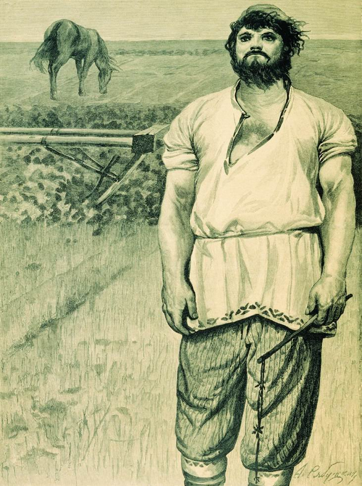 Микула Селянинович. 1895. Иллюстрация к книге "Русские былинные богатыри"